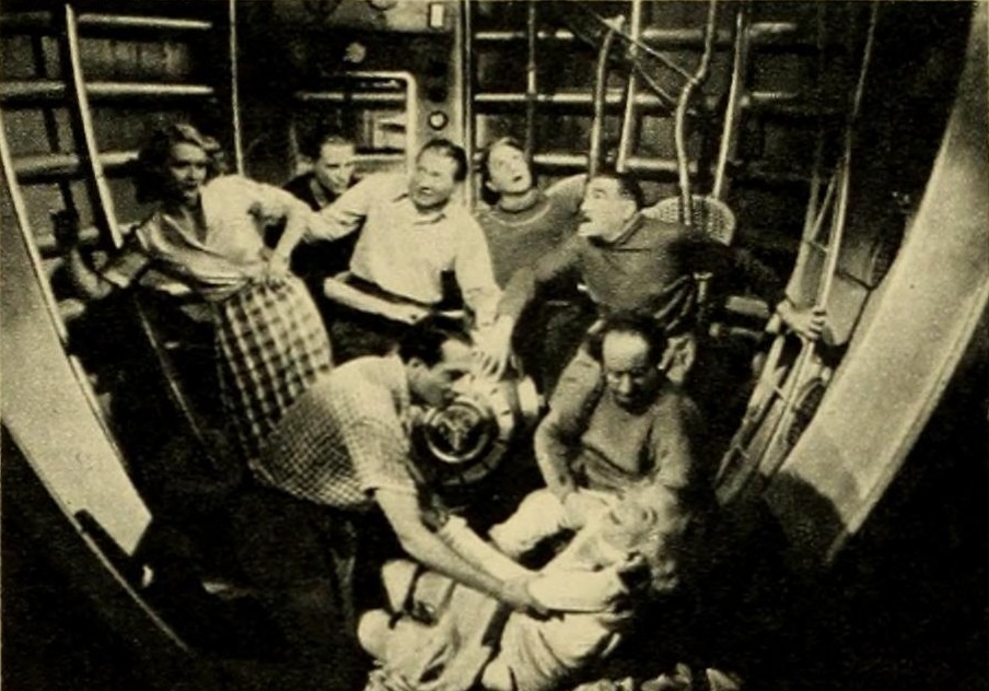 Foto di scena del film 1000 km al minuto! di Mario Mattoli (1939) Tratta da "Cinema" n. 91, 10 aprile 1940